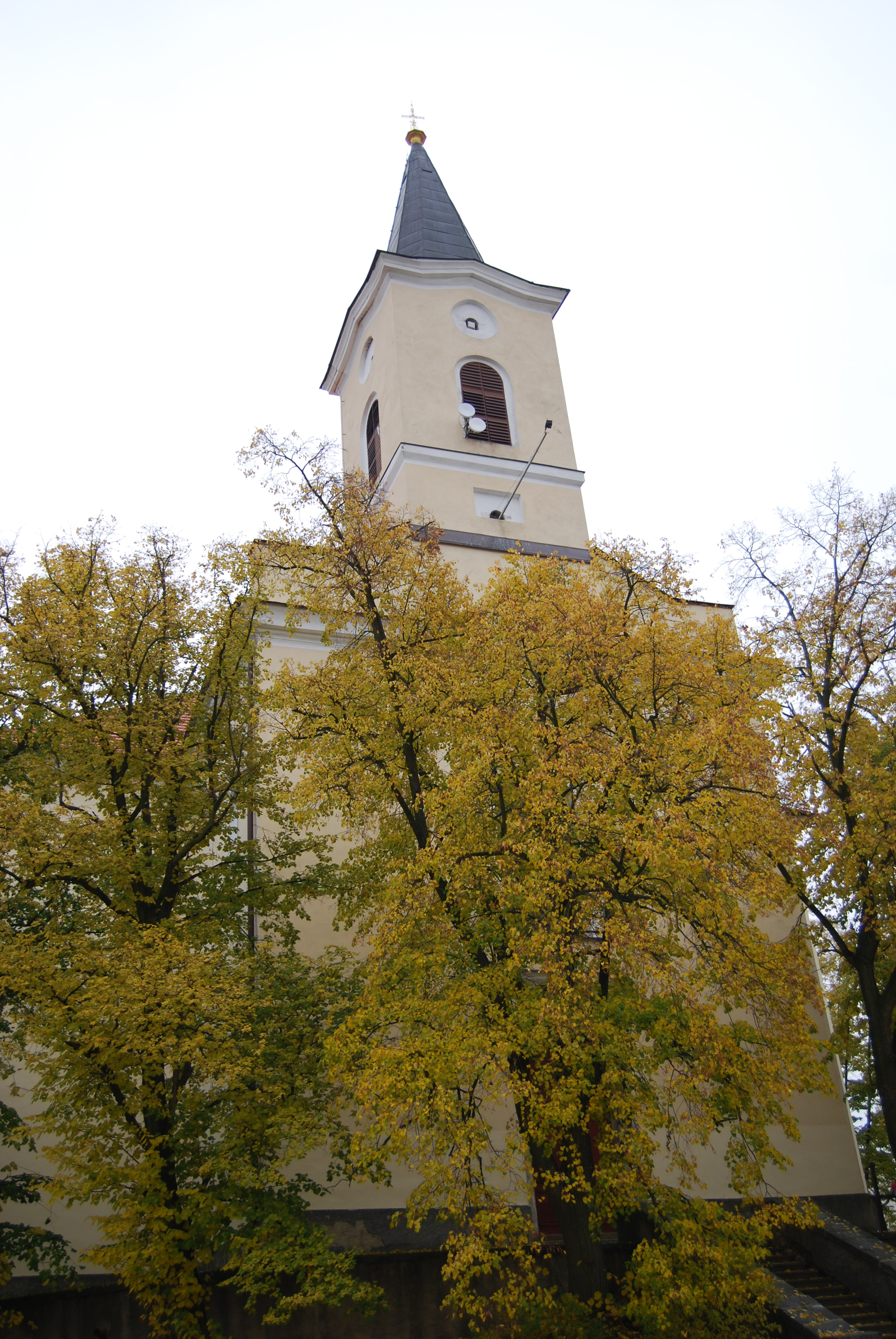 Kostel svatého Mikuláše poblíž náměstí. Krásná Hora nad Vltavou. Okres Příbram. Česká republika.